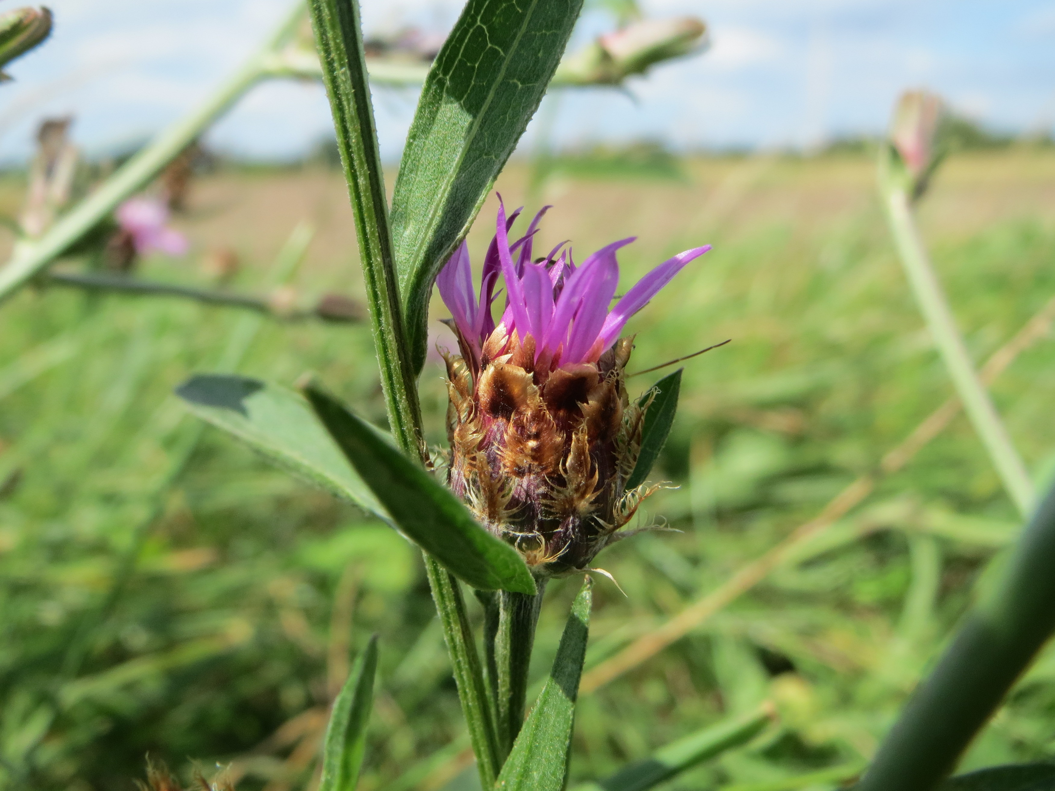 Wiesen-Flockenblume (Centaurea jacea) bei Hockenheim